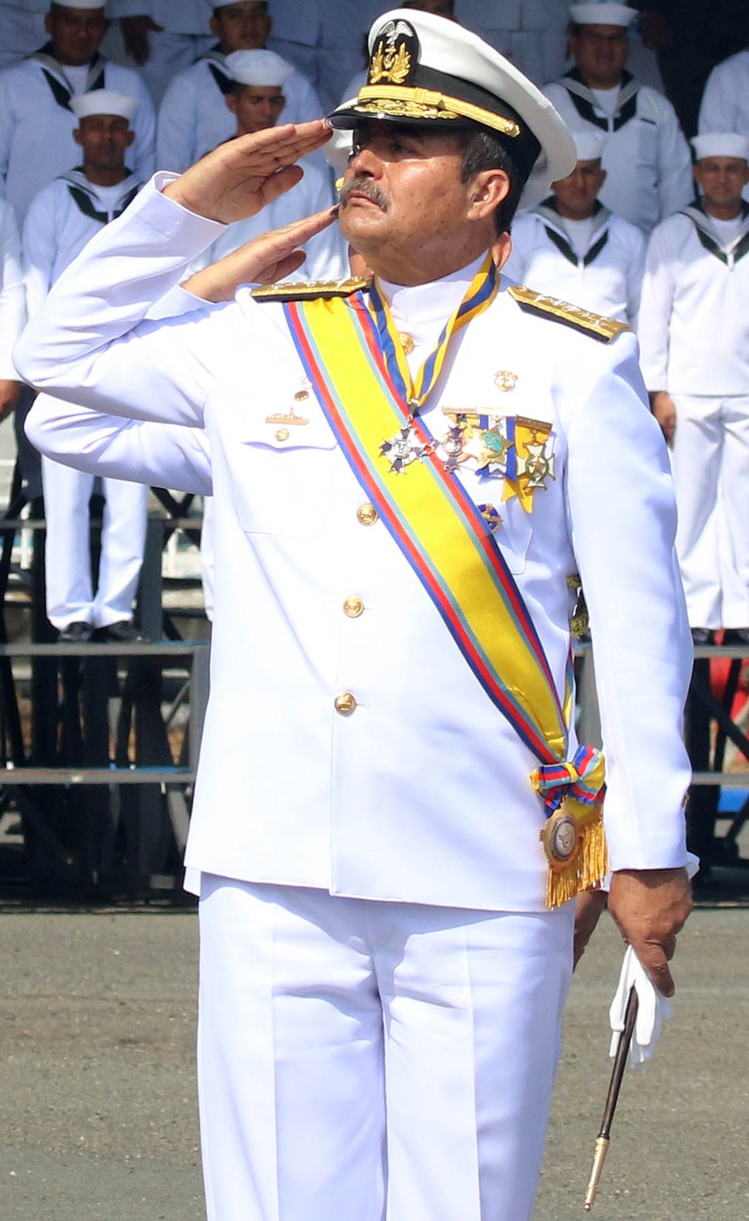 El capitán de navío Fernando Noboa Rodas, asumió el cargo de comandante general de la Marina en reemplazo del vicealmirante Ángel Sarzosa Aguirre. Sarzosa (en la imagen) luce la banda de la Orden de Abdón Calderón.